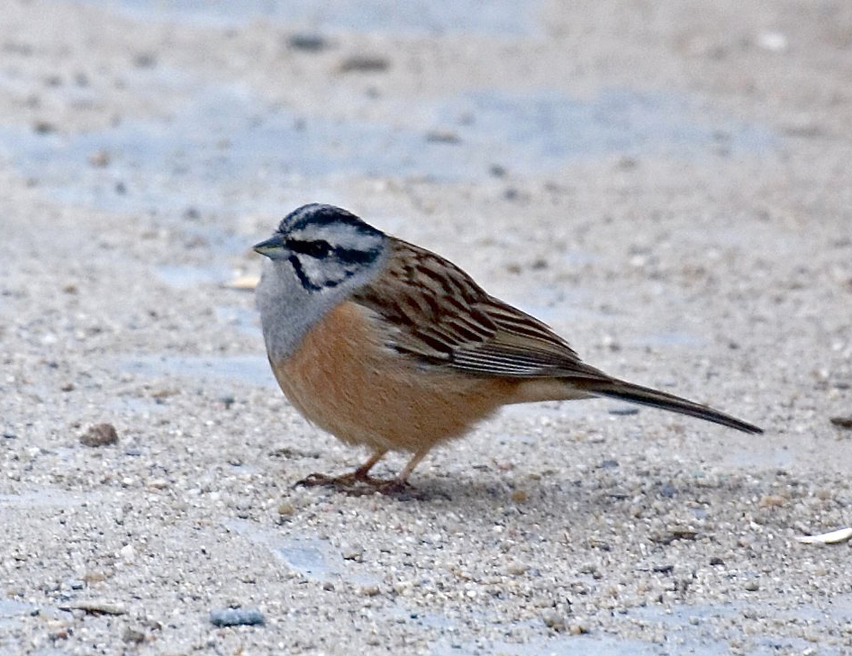 Emberiza cia